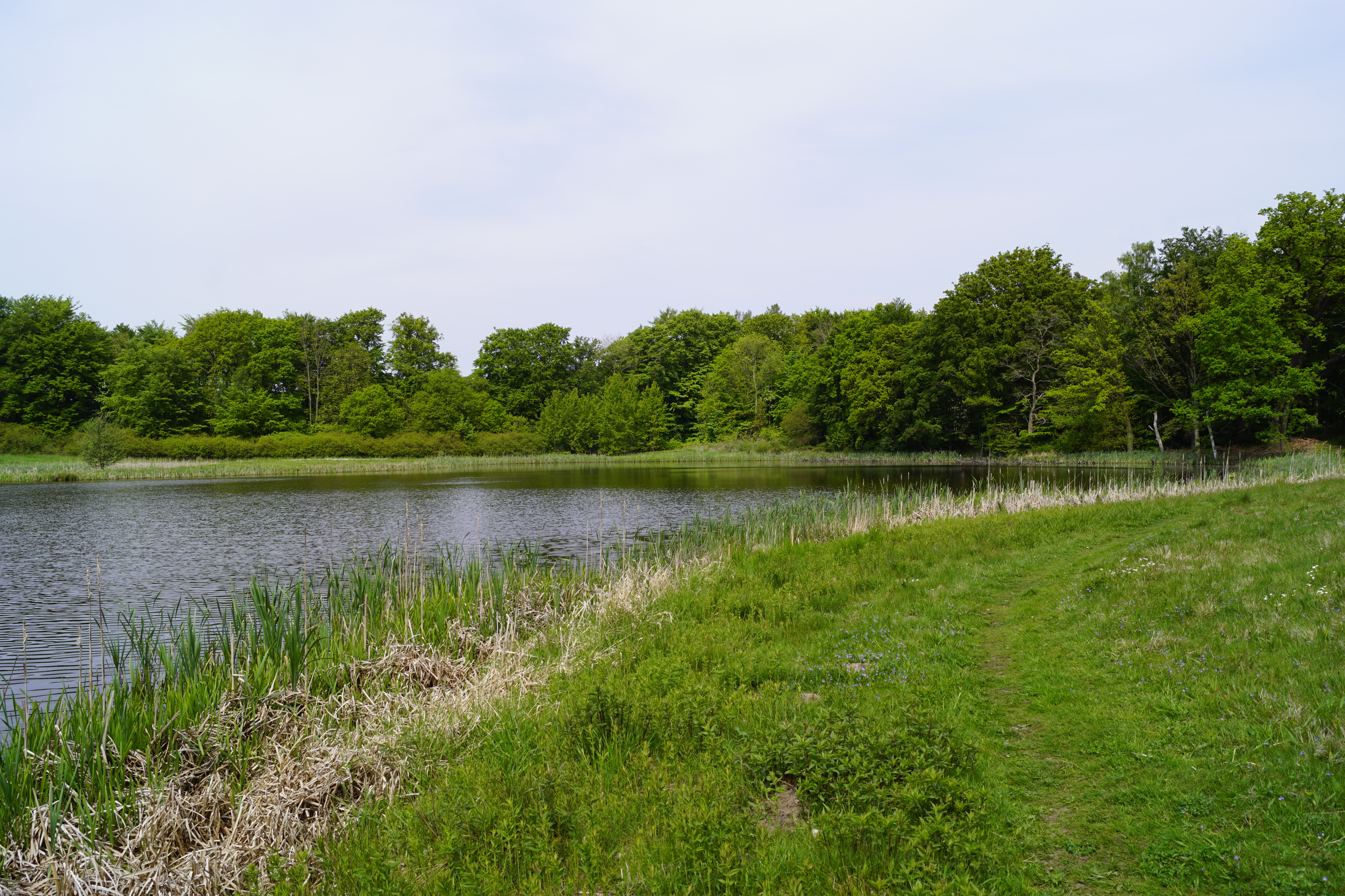 Hammersmølle Skov ved Bøgeholm Sø set mod nordvest